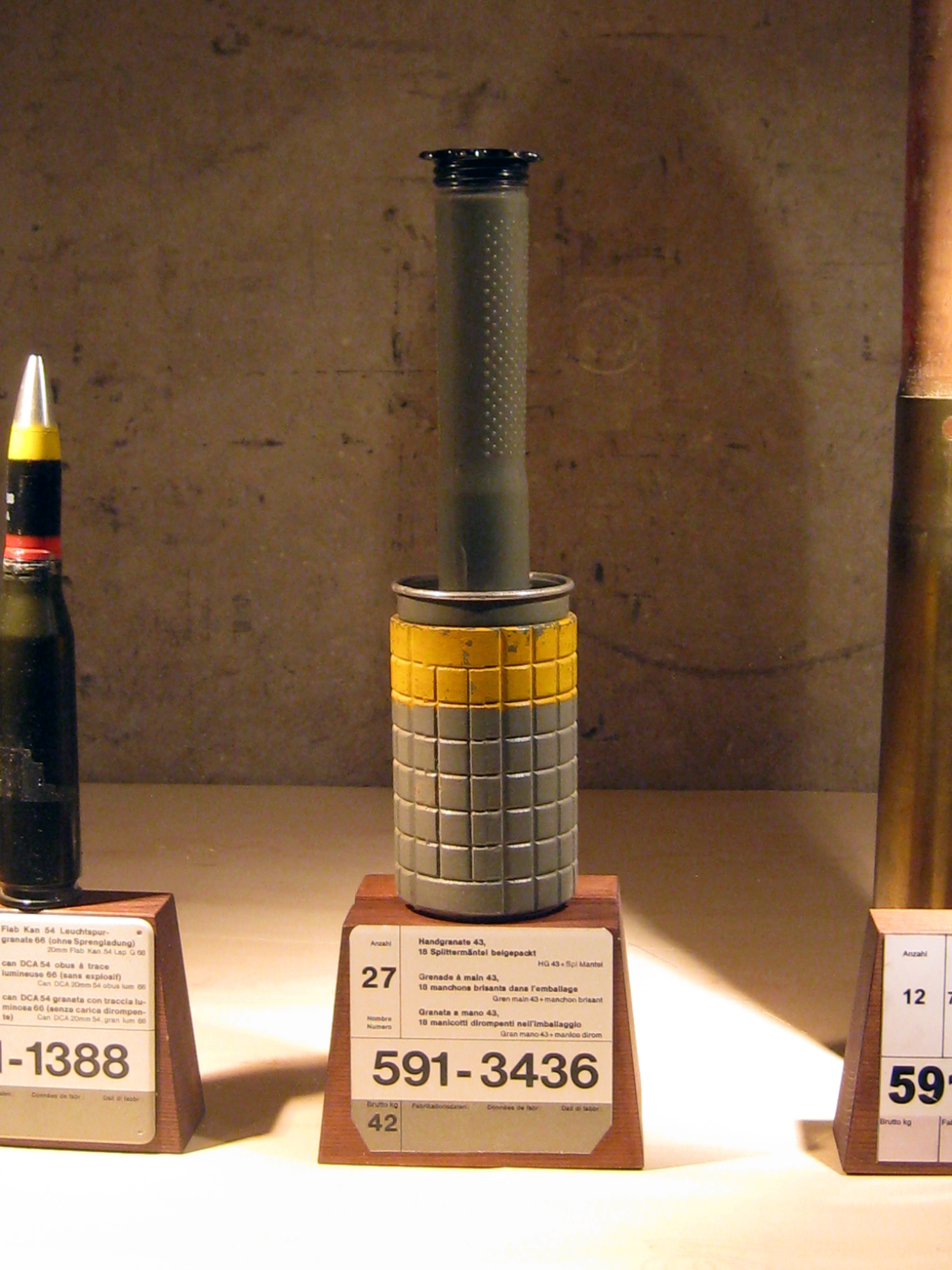 Festungsmuseum Crestawald, Handgranate 43 mit Splittermantel